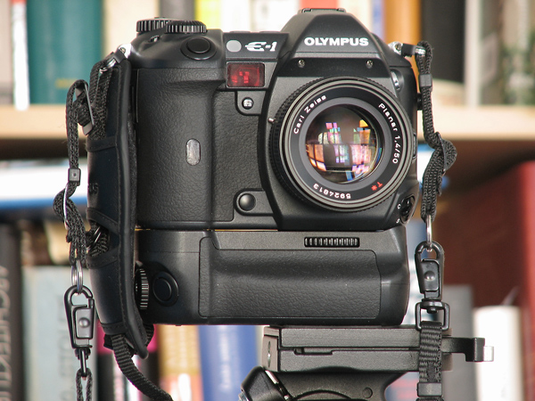 Olympus E-1 + EZ1454 na stativu